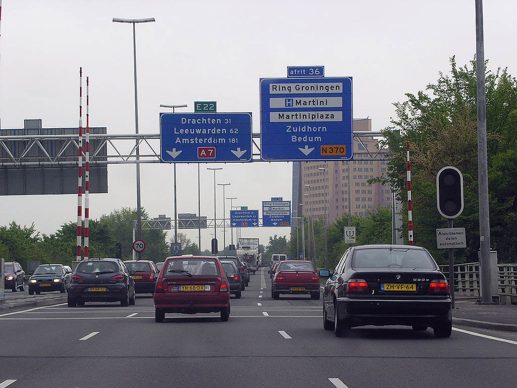 De A7/N7 nabij knooppunt Julianaplein